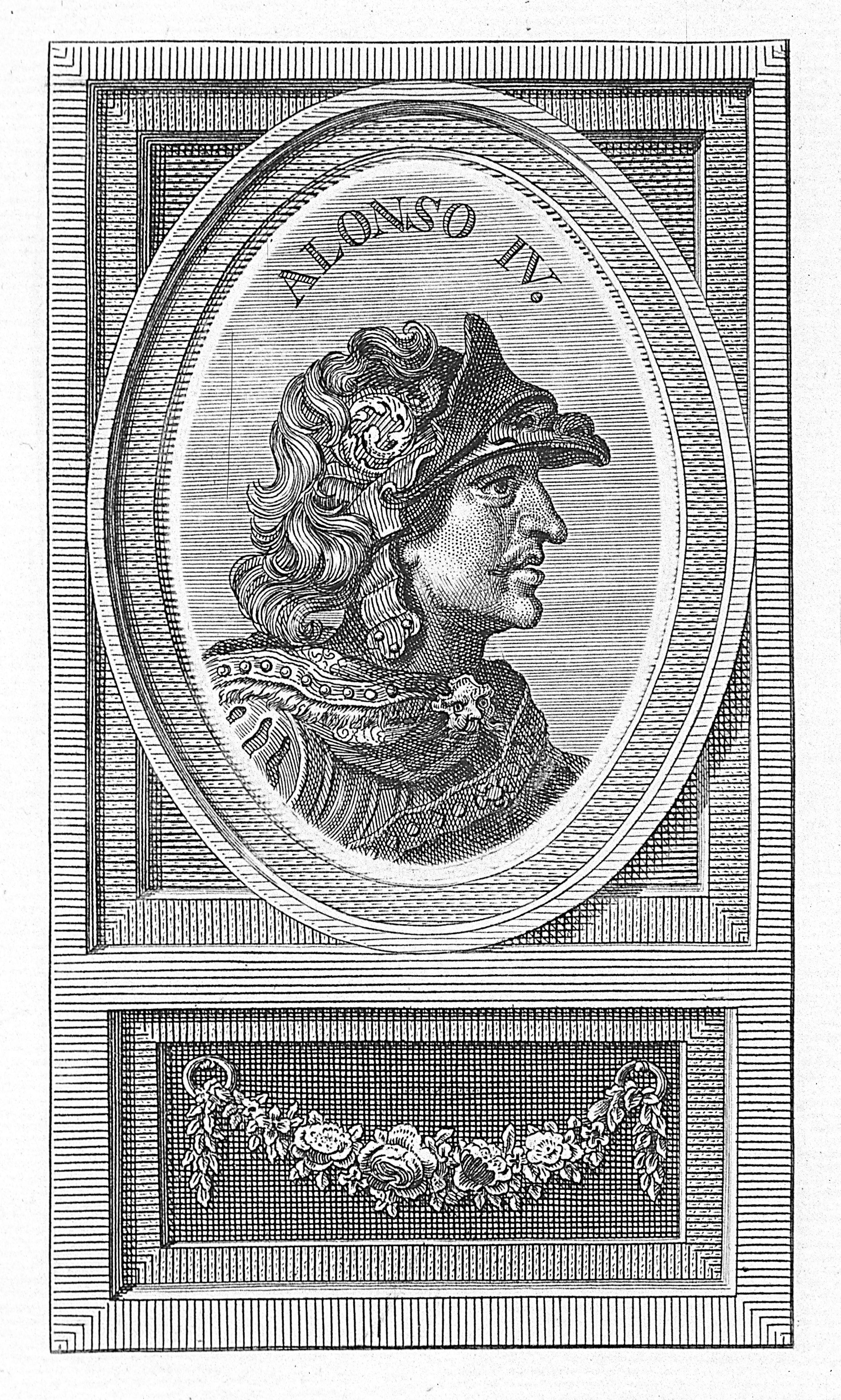 Título: Alfonso IV, Rey de Asturias y León Publicación: [En Madrid : por Don Benito Cano , 1794] 1 estampa : grab. calc. ; imagen 130 x 74 mm Notas: Inscripción en el óvalo: "ALONSO IV." Basado en el grabado por Westerhout Iconografía Hispana 235-7 Busto perfil a la derecha con casco. Marco ovalado en rectángulo